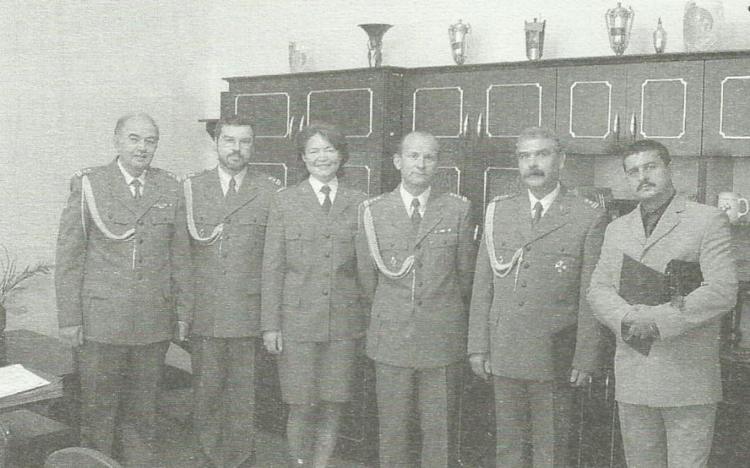 Szczecin,2002 r. Pożegnanie wojskowych lekarzy do rezerwy ze 109 Szpitala Wojskowego - od prawej mjr rez. Janusz Gręda, ppłk rez. Andrzej Laskowski, płk Tomasz Dudzik, mjr Małgorzata Jekel, ppłk Dariusz Banachowicz, ppłk rez. Marian Syrek